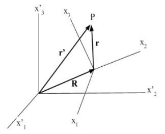 Sistema fixo de coordenadas, em que o vetor R se posiciona a partir da origem do sistema rotacional.(THORNTON; MARION, 2011)